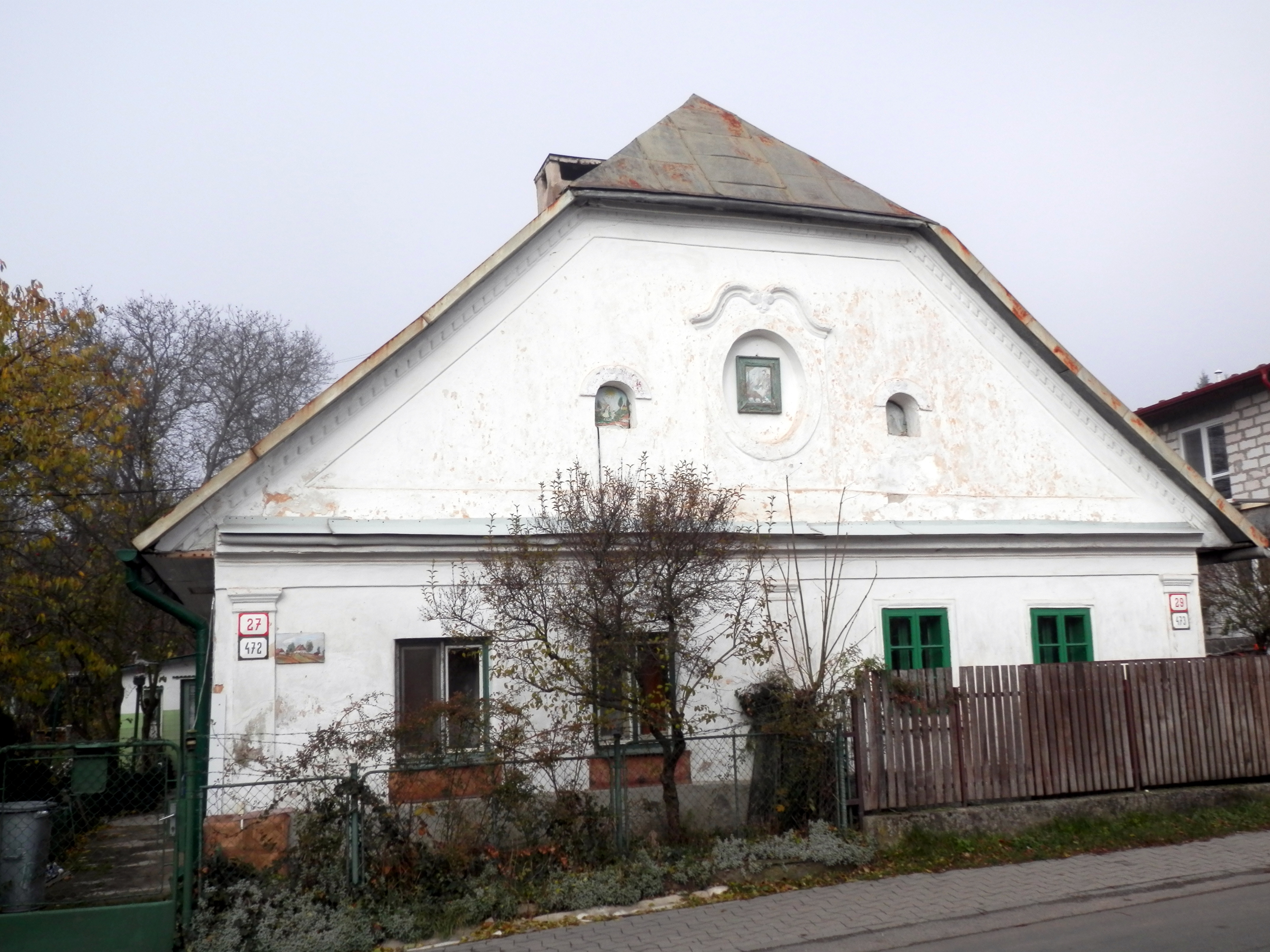 Ulica Soľnobanská 27 a 29. Mesto Prešov. Národná kultúrna pamiatka - meštiacky dom.